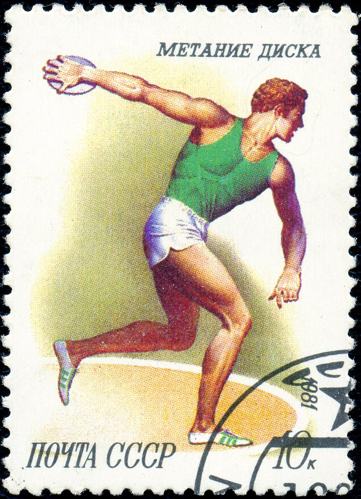 Почтовая марка СССР. 1981. Метание диска